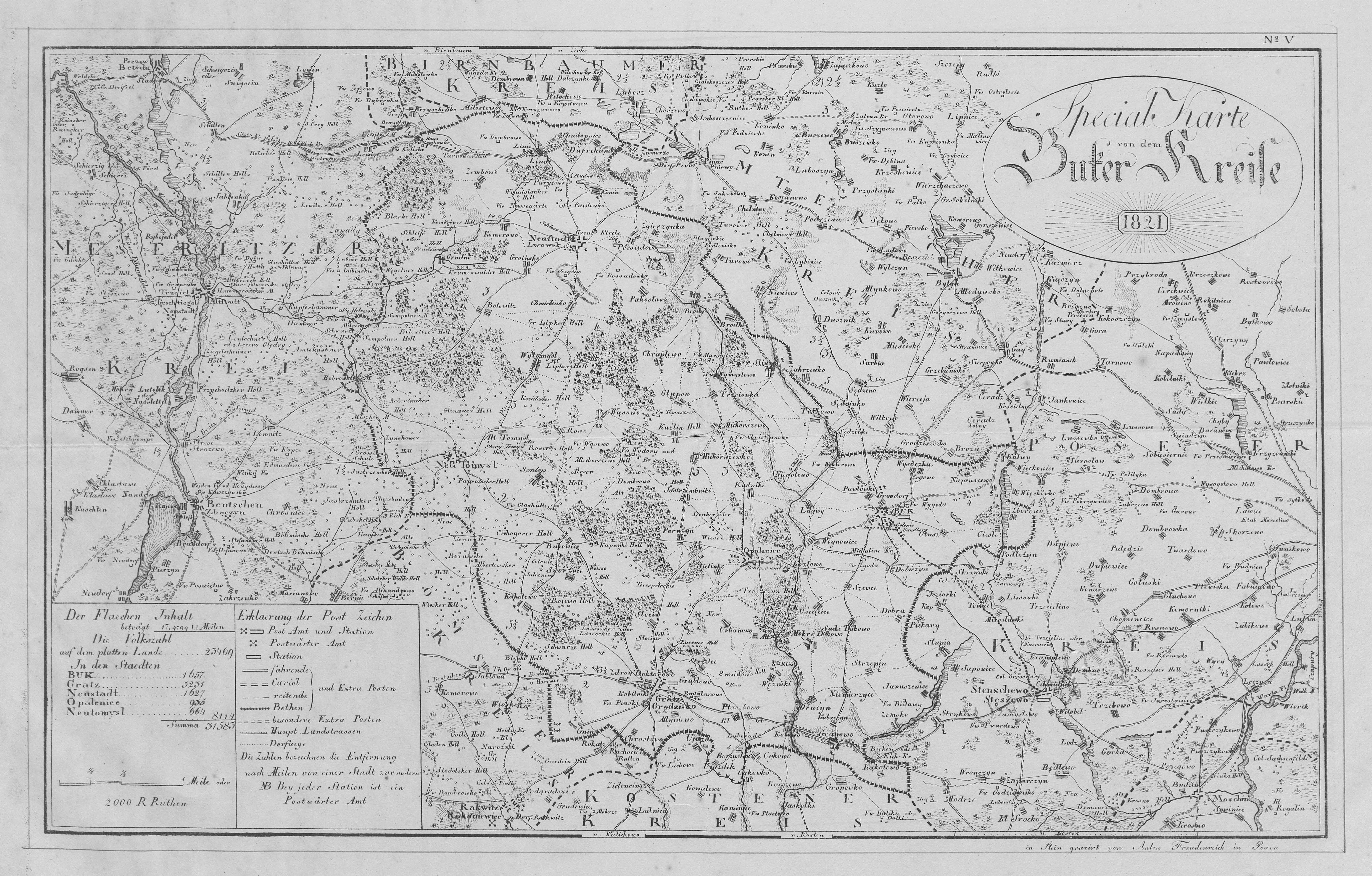 Kreis Buk as from 1818 to 1887